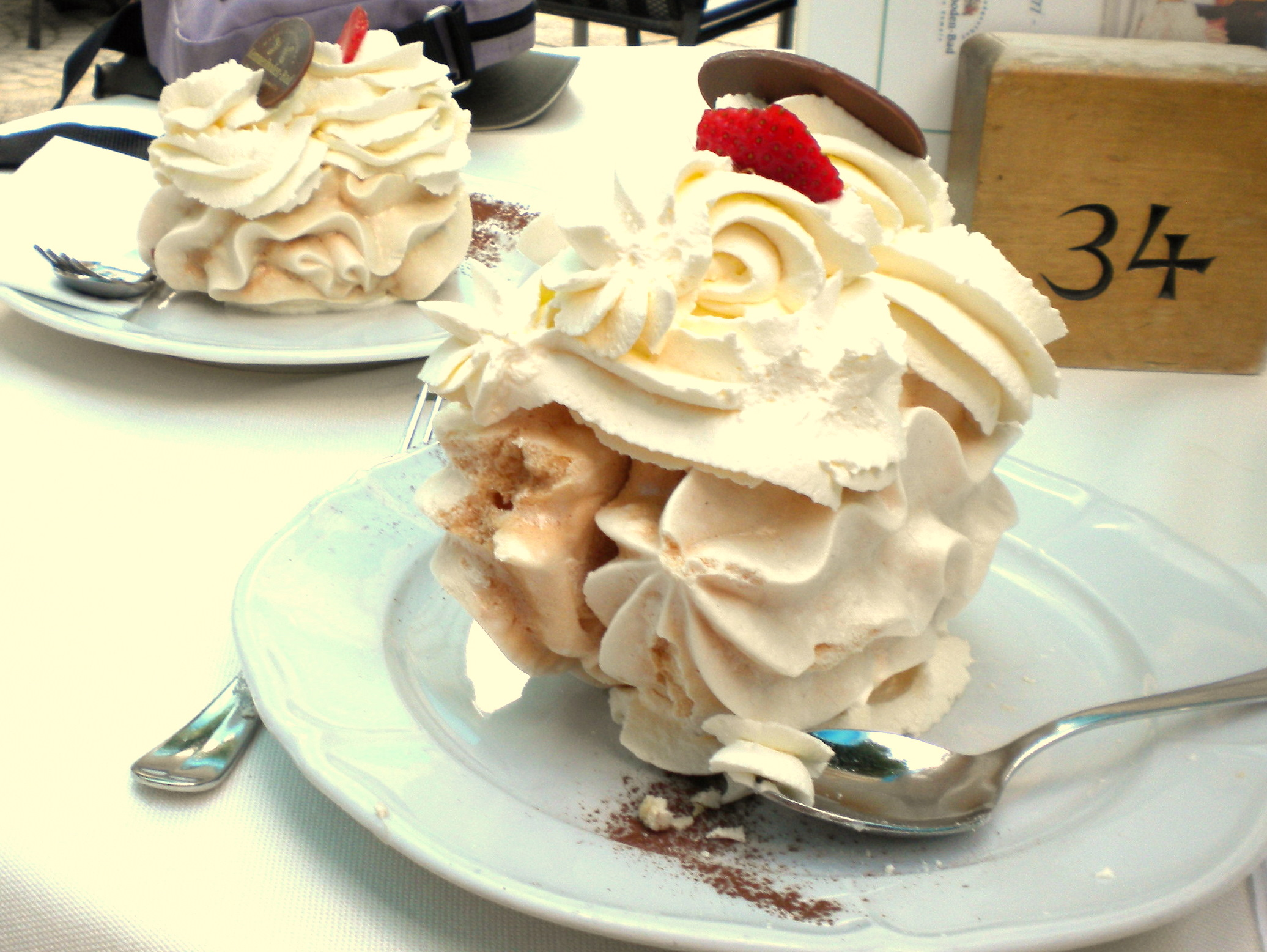 Meringue suisse à la crème